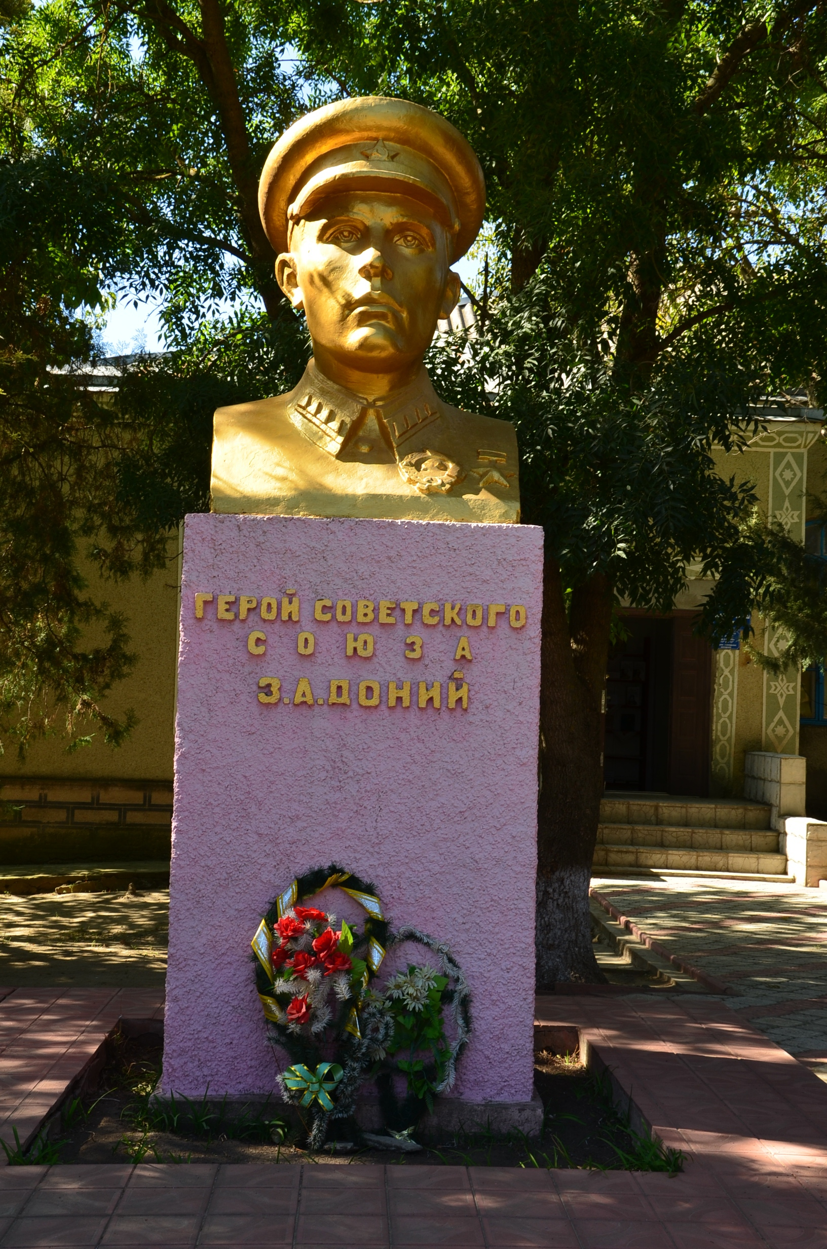 Пам'ятник Герою Радянського Союзу старшині Донію З. О., Новоодеський район, Село Підлісне, біля будинку культури